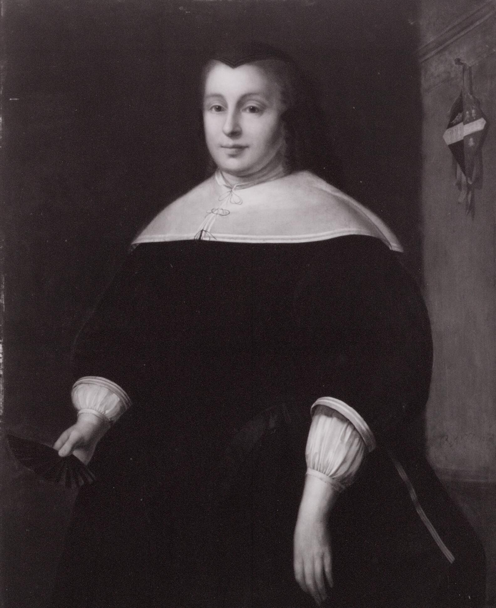 Ida Coetenburg (overl. 1679), dochter van Reinier Adriaensz Coetenburgh en Adriana Jansdr Graeff; gehuwd met Jordaen Pietersz Stoop